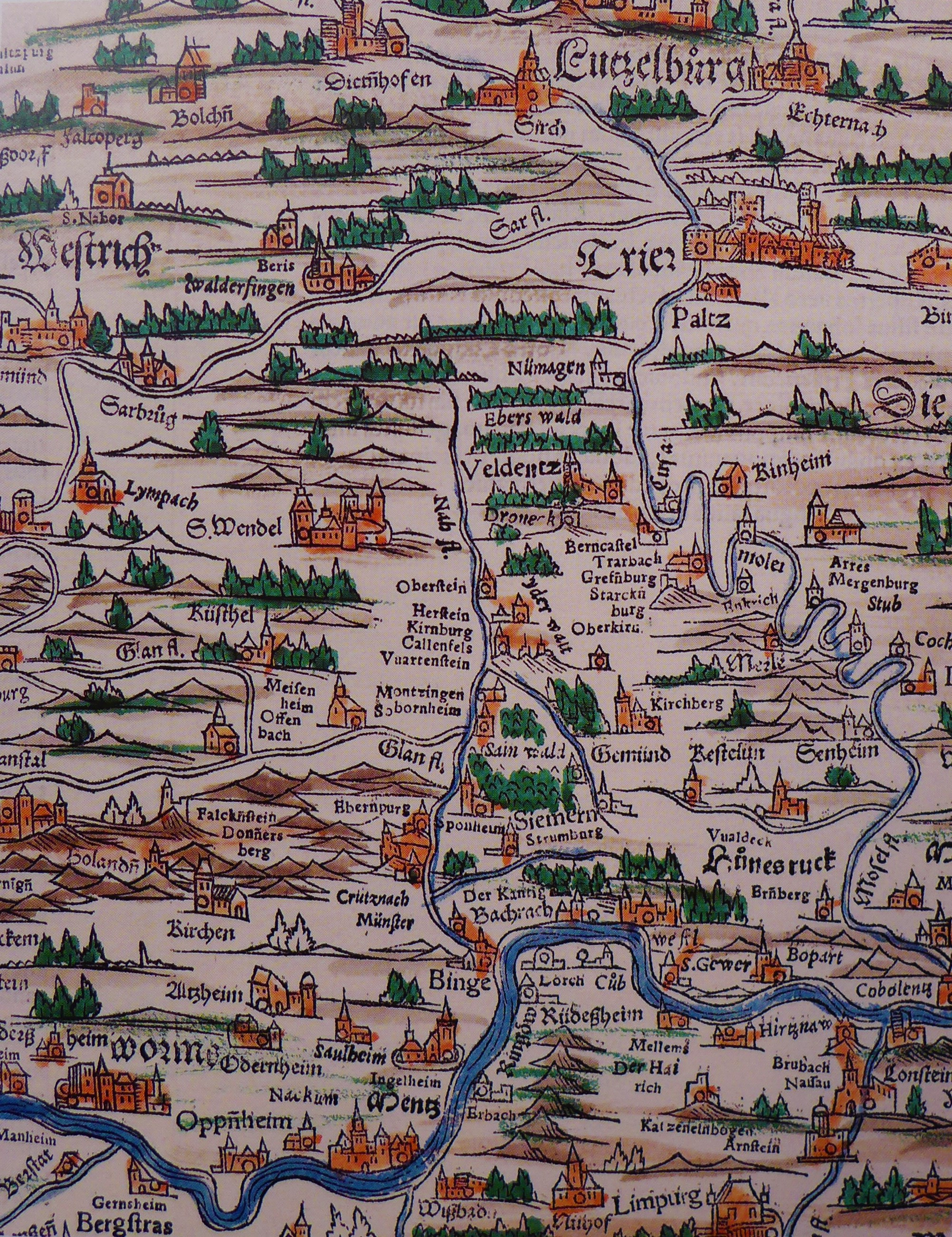 Sebastian Münster: Ausschnitt aus der dreiteiligen, gewesteten Rheinlaufkarte (1544), (Landesarchiv Saarbrücken, Sammlung Hellwig)